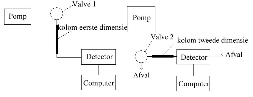 Opstelling MDLC